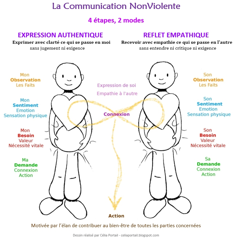 Les 4 étapes du processus de la CNV Dessin réalisé par Célia Portail